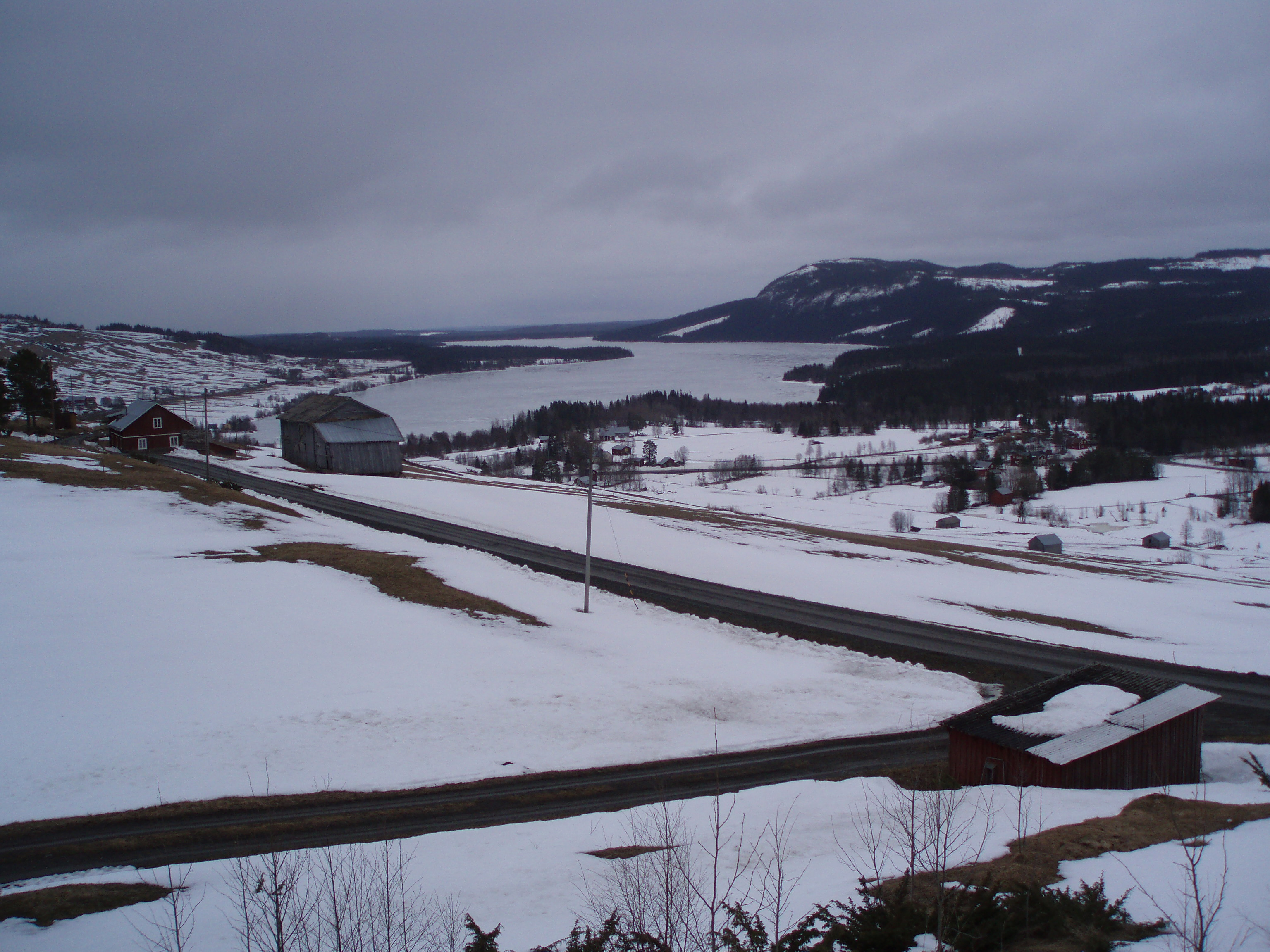 Åflo, Offerdals socken, Krokoms kommun, Jämtlands län, Sverige